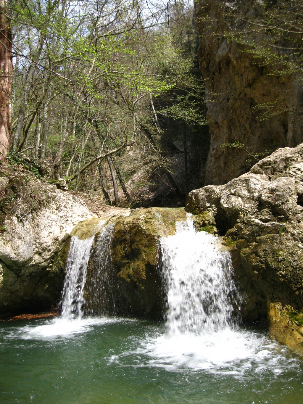 Черемисовские водопады. Водопад "Любви" и ванночка "Любви". Ущелье Кок-Асан Белогорского райна, Украина, Крым.